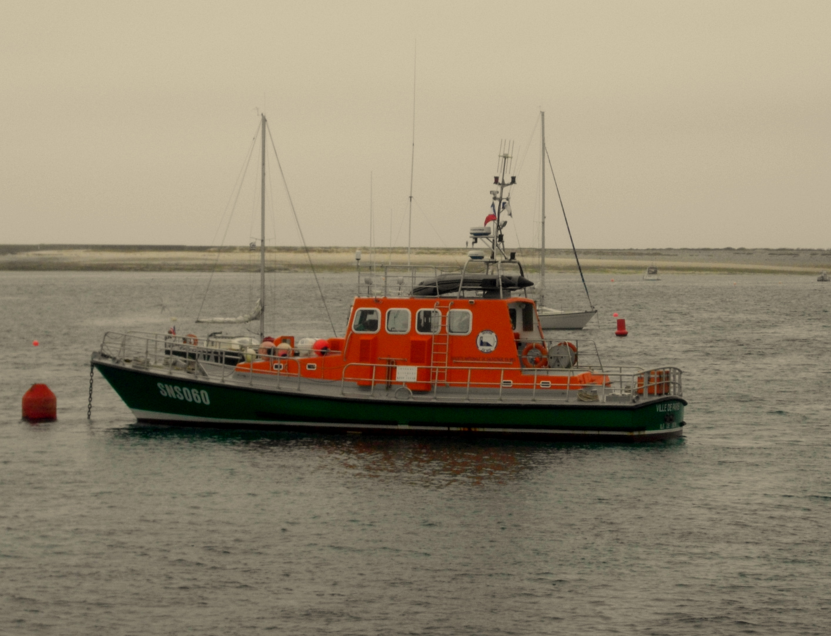 Canot tout temps : VILLE DE PARIS SNS 060 (Île de Sein)